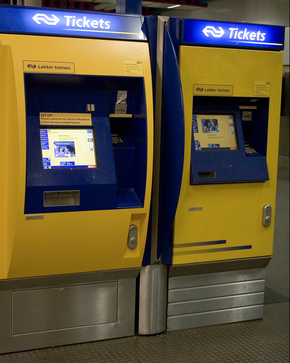 Zelf gemaakte foto. Genomen op NS station Utrecht Centraal